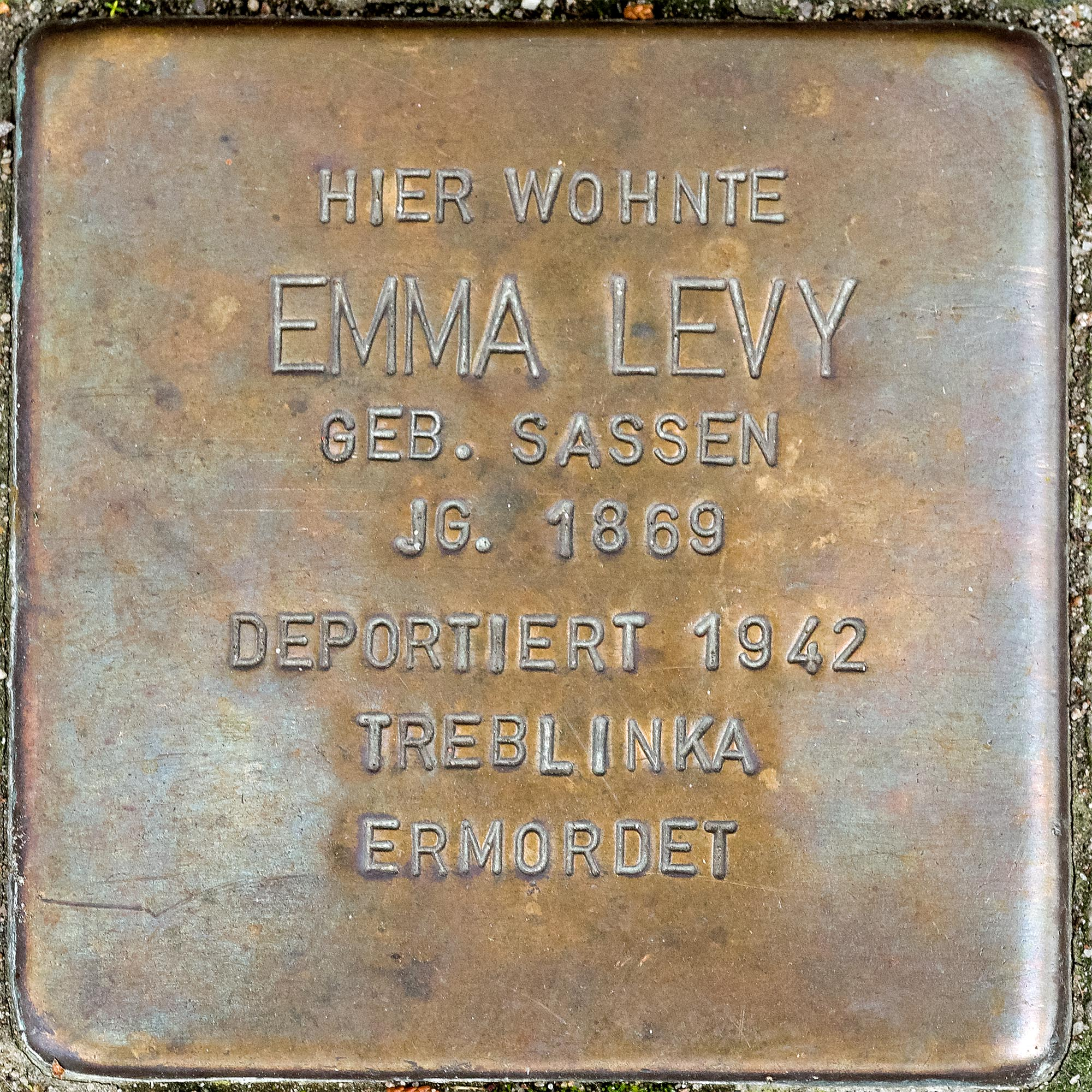 Stolperstein Levy, Emma